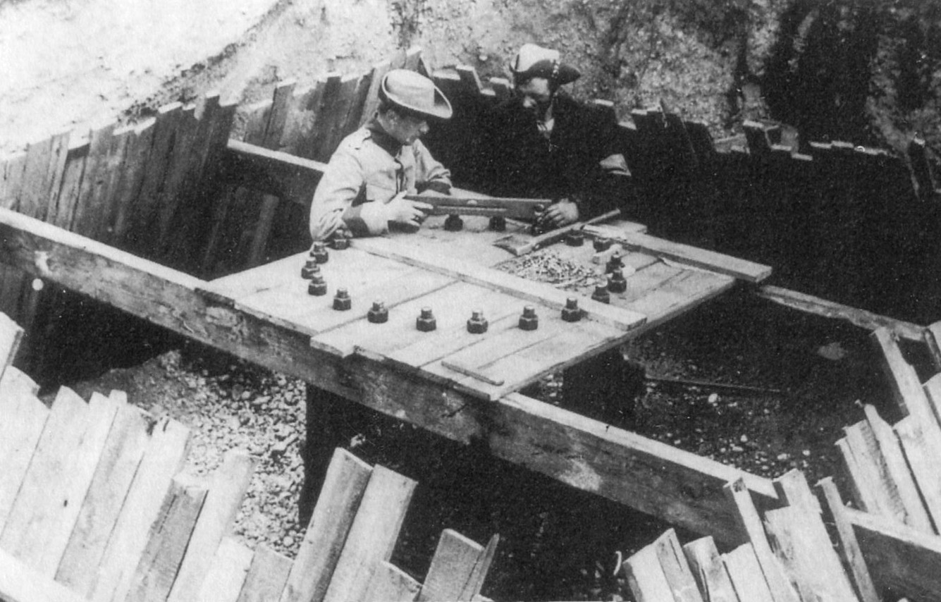 Mobilisering vid Skansholmen, fundament till en 12 cm kanon gjuts